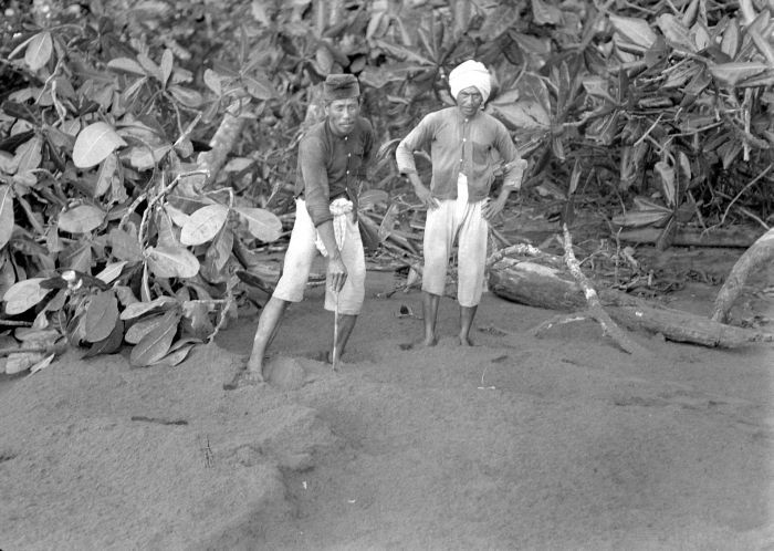 Negatief. Plaatsaanduiding waar zeeschildpad haar eieren gelegd heeft, Bandialit-baai, oost-Java